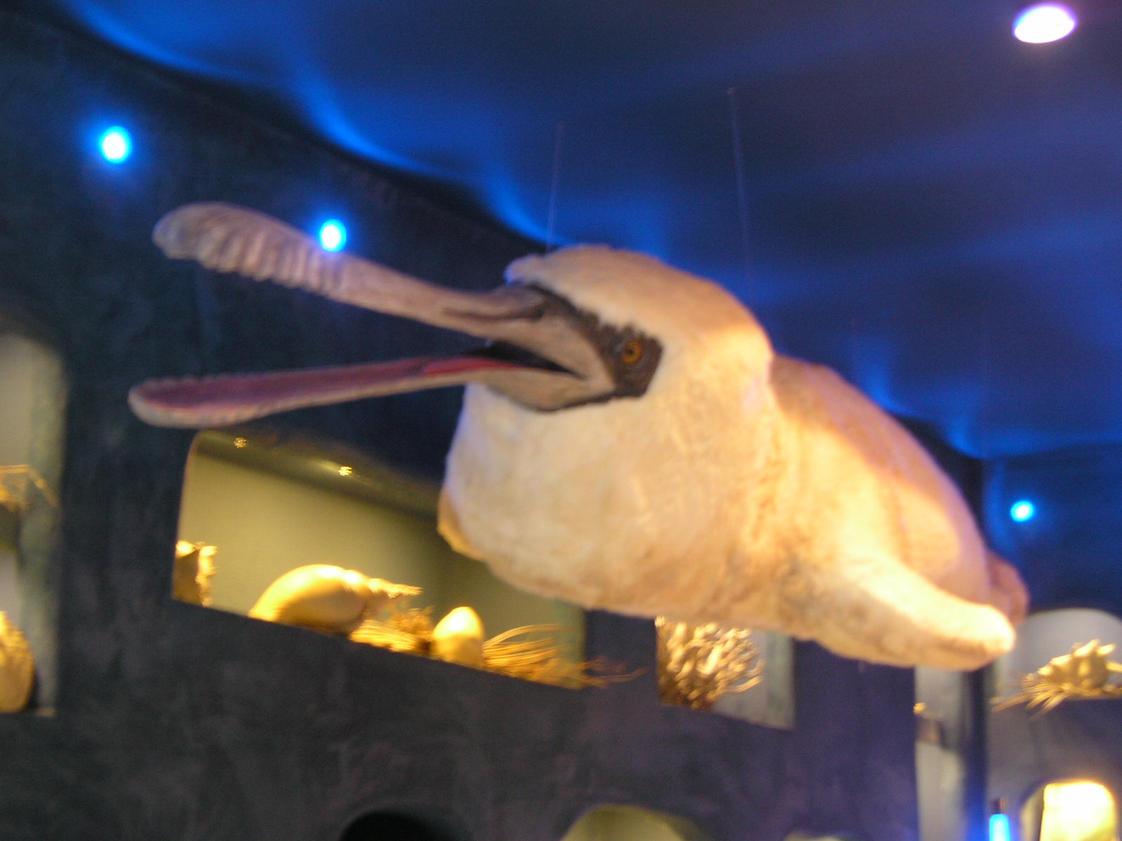 Le "fou-baleine", issu de l'attraction Les Animaux du Futur du Futuroscope.